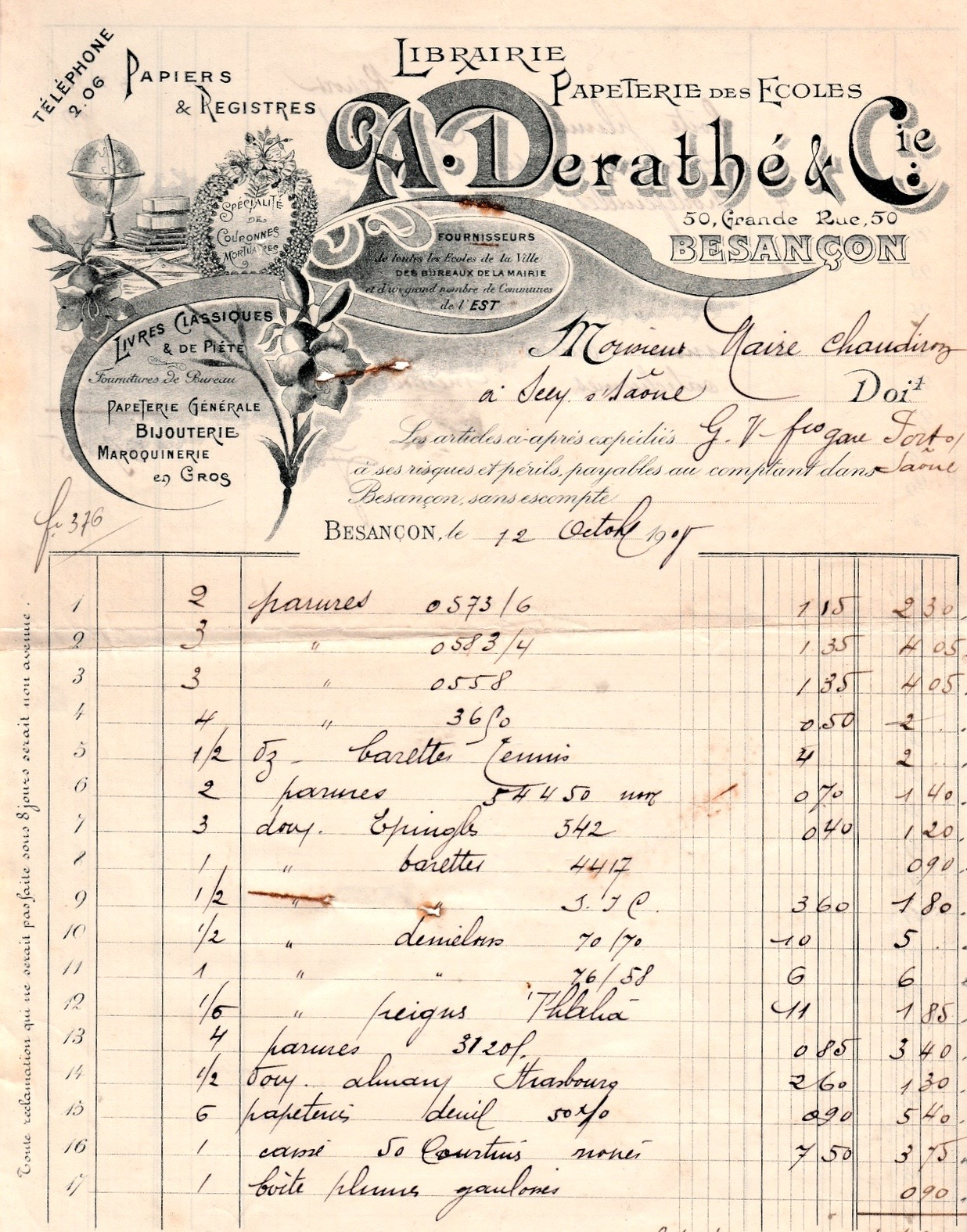 Librairie Alfred Derathé, 50 Grande rue à Besançon, 12 octobre 1908 ; papier comptabilité.